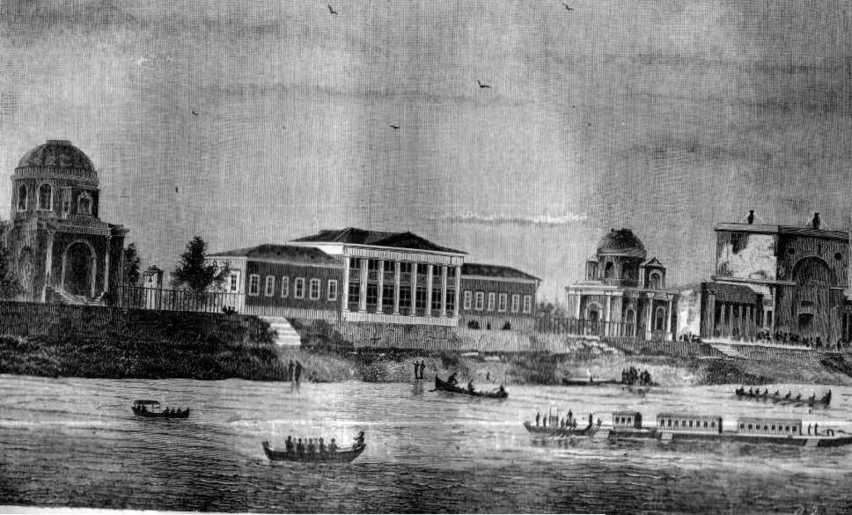 Гравюра Вильяма Хатфильда, посвящённая прибытию в Кременчуг императрицы Екатерины II в 1787 году